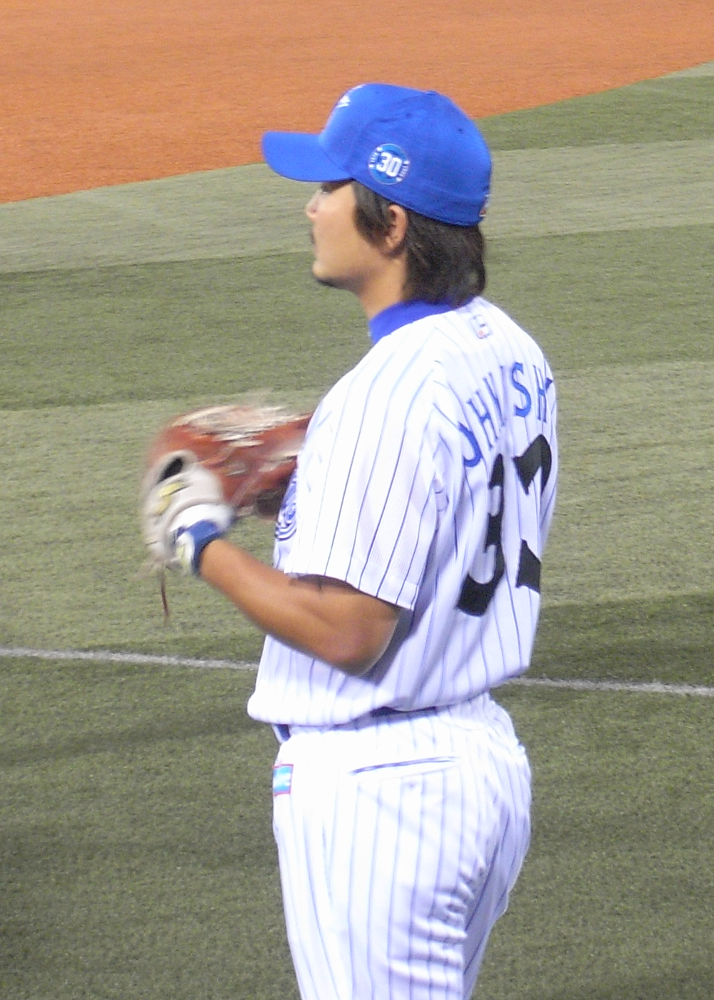 Hiroaki Ohnishi (大西宏明)